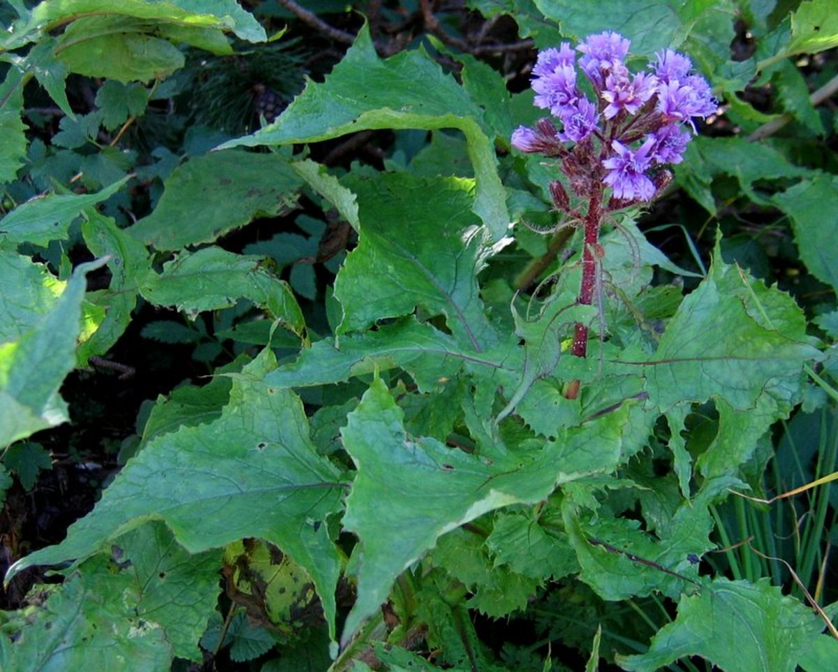 Navadna gorska ločika na Snežniku.